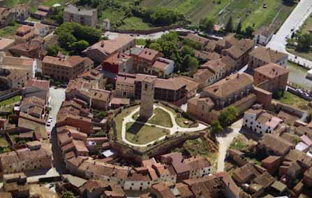 Fotografía Comarca del Jiloca - Monreal del Campo